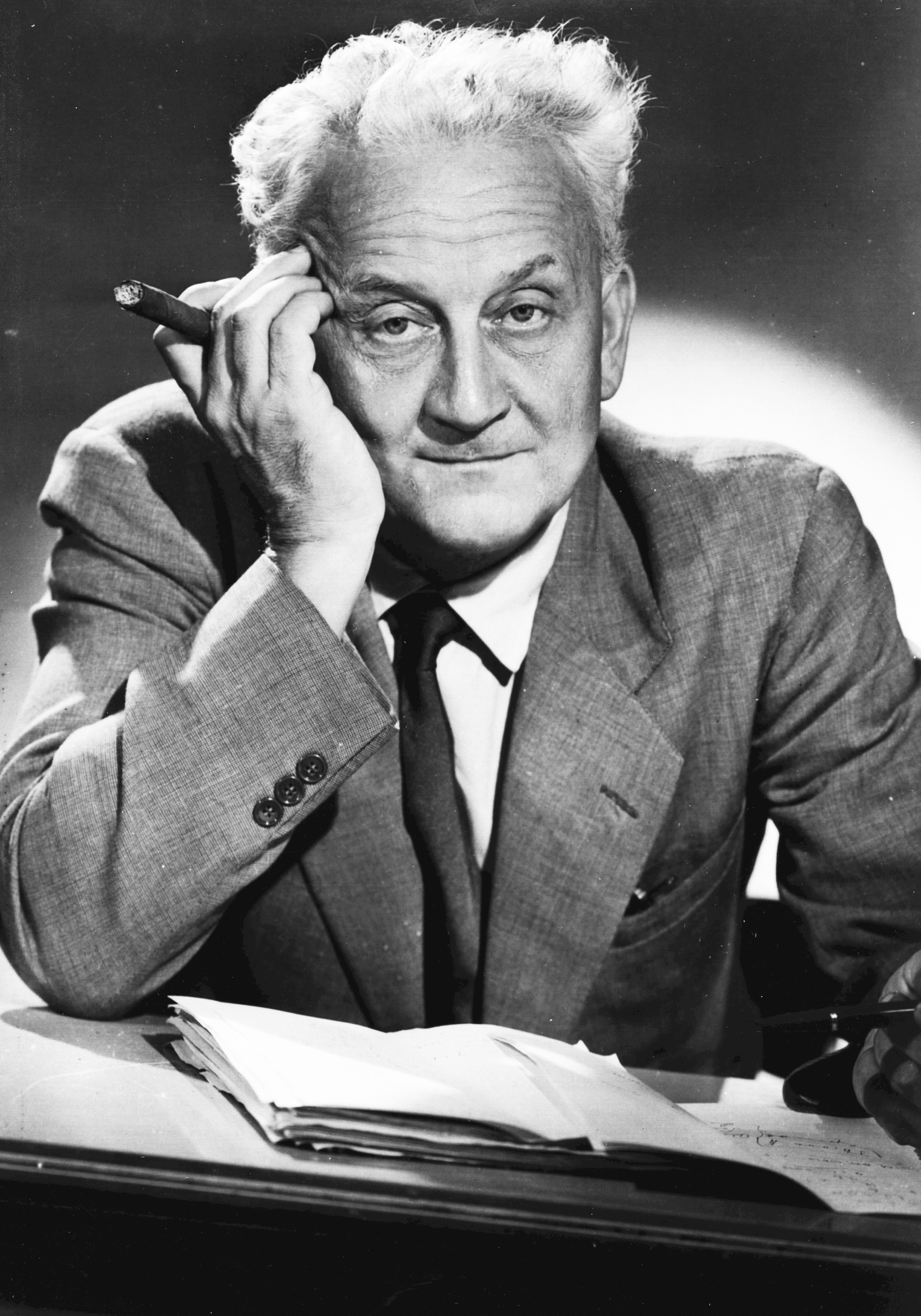 Szent-Györgyi Albert, Nobel-díjas és Kossuth-díjas orvos, biokémikus. Location: Hungary Title: Szent-Györgyi Albert, Nobel-díjas és Kossuth-díjas orvos, biokémikus.